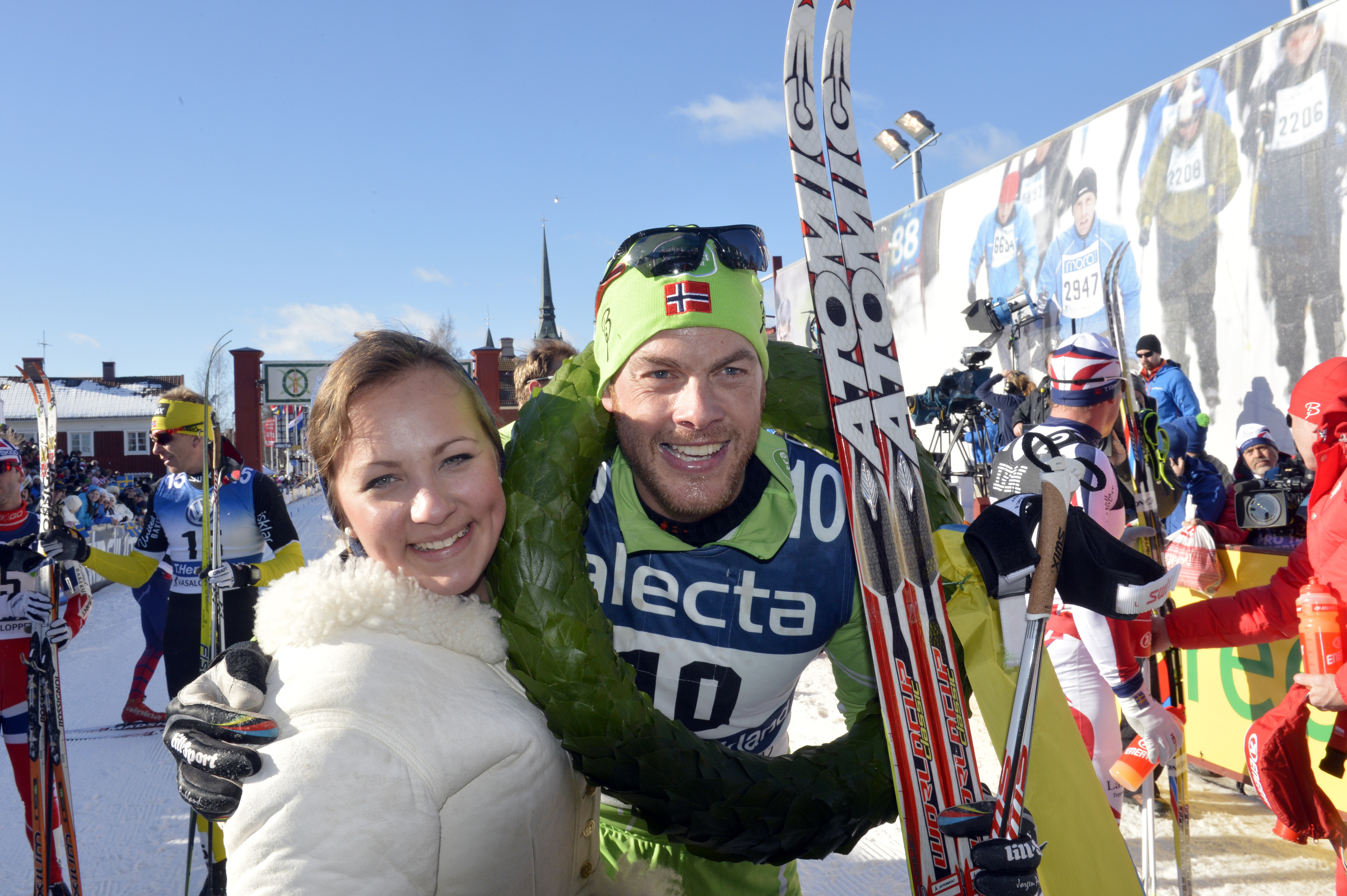 Jørgen Aukland med kranskullan Isabelle Jansson efter segern i Vasaloppet 2013.